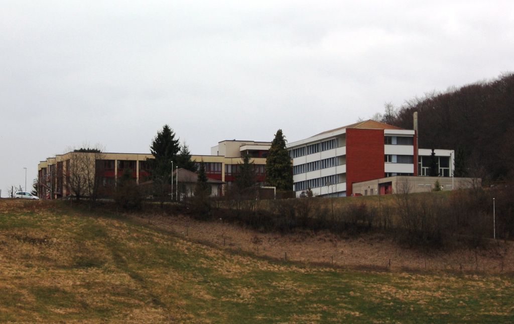 Bezirksspital Tafers, Kanton Freiburg, Schweiz